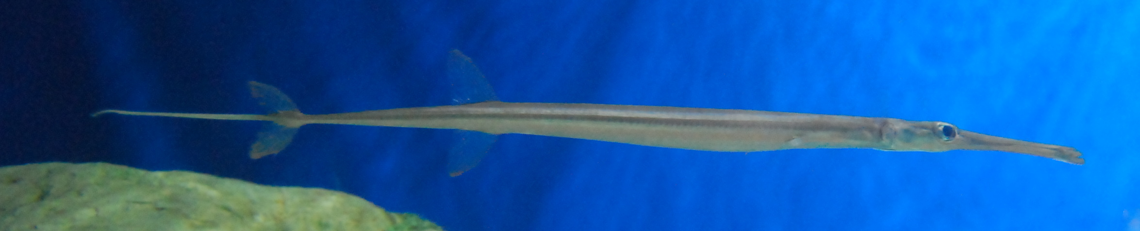 北京海洋馆中的无鳞烟管鱼